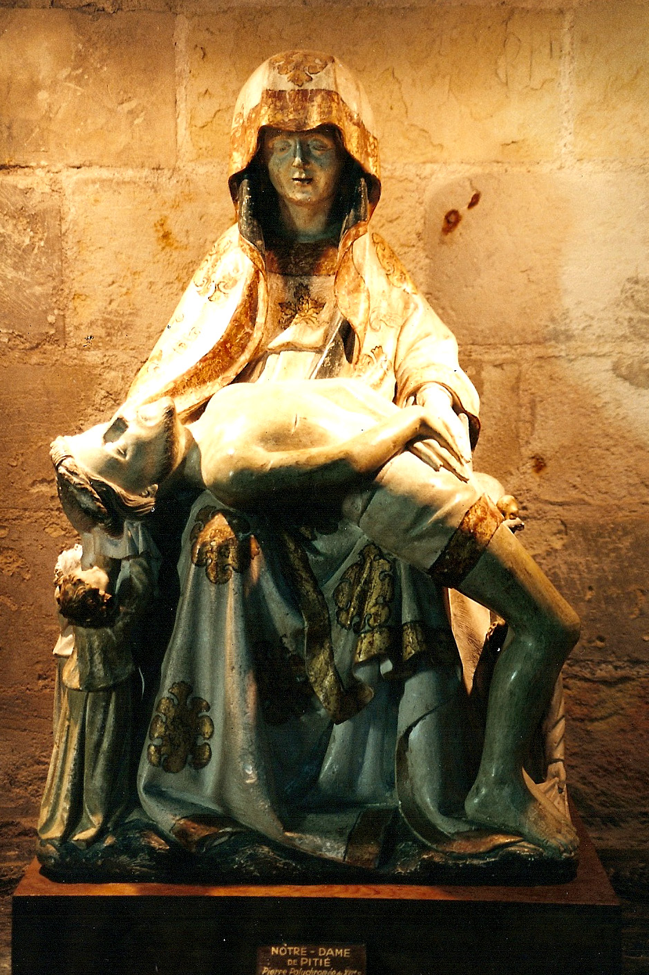 N.-D. Cunault, Pieta aus Stein, farbig gefasst